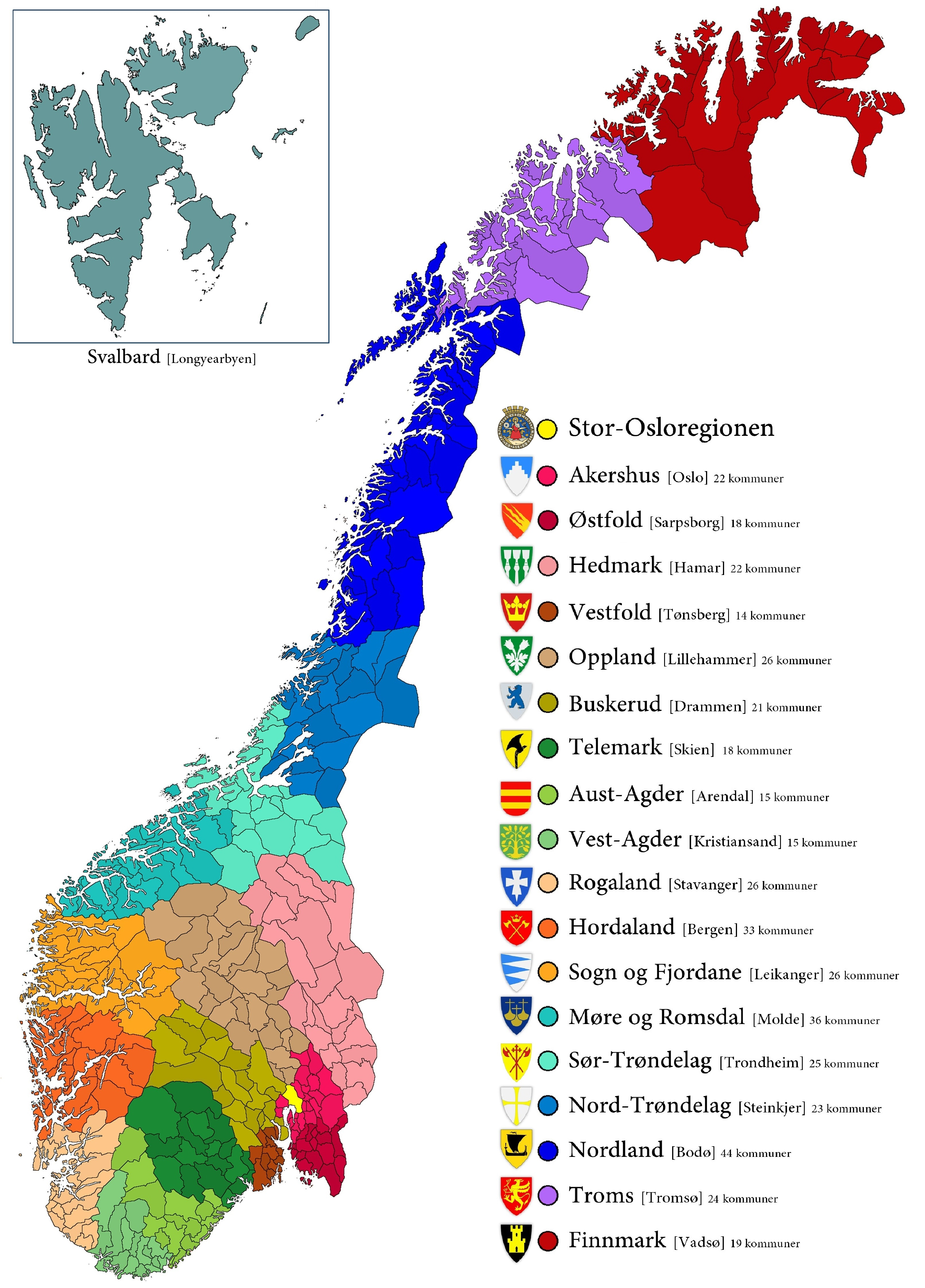 Regioni della Norvegia